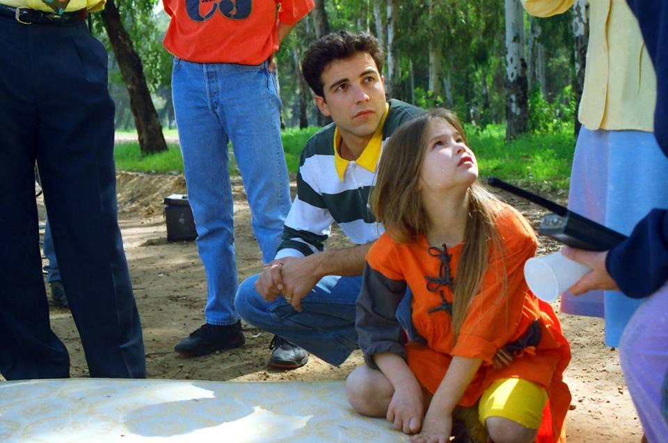 בר רפאלי ואמנון פישר באתר הפרסומת למילקי